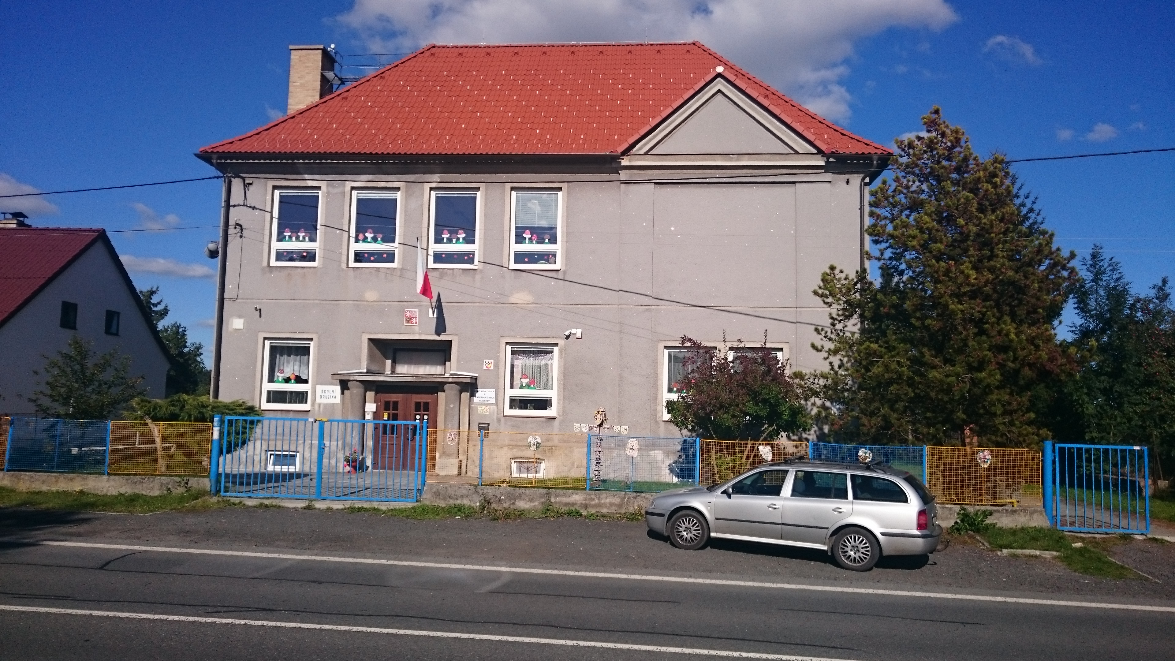 Obecní úřad v Bězevěrově. Okres Plzeň-sever, Česká republika.